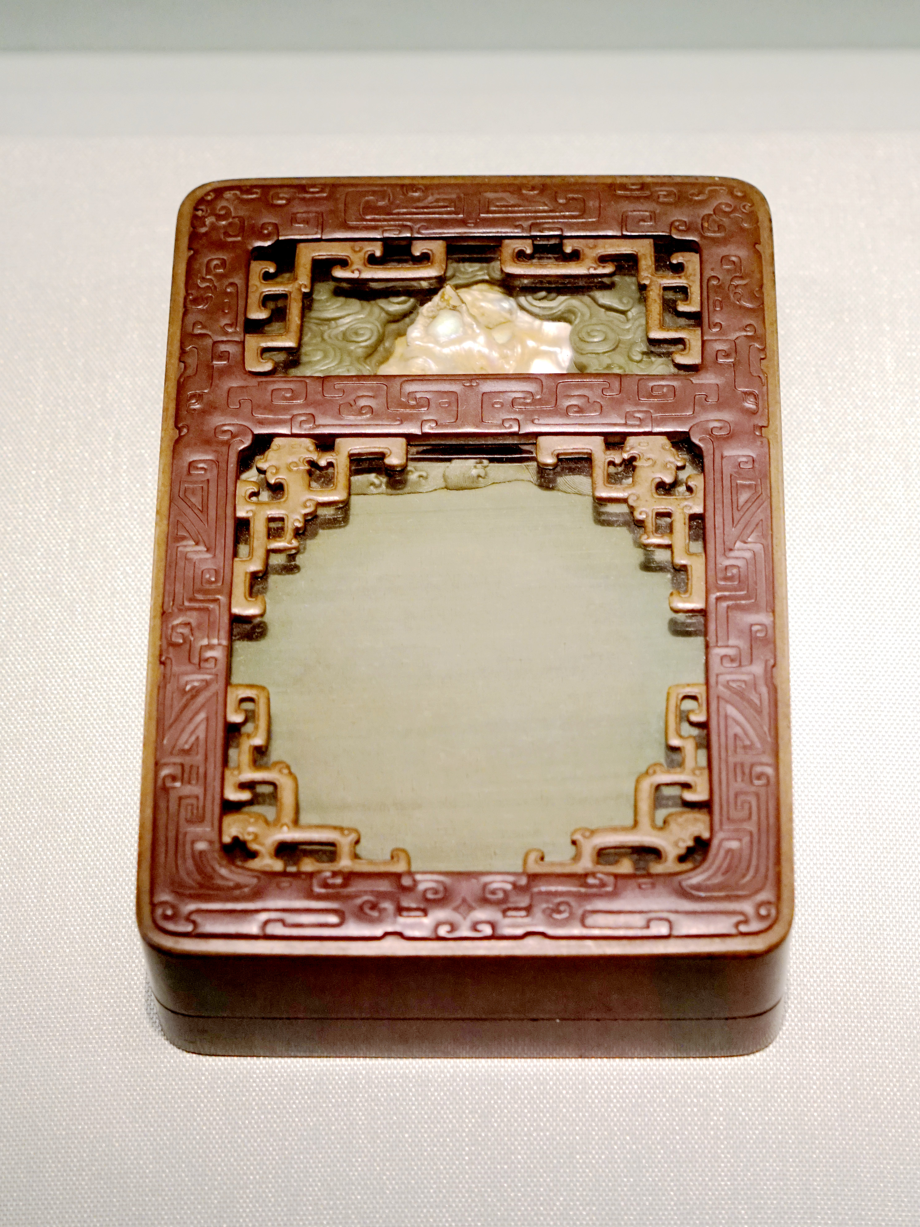 中文（中国大陆）: 松花石雕海水龙纹池砚